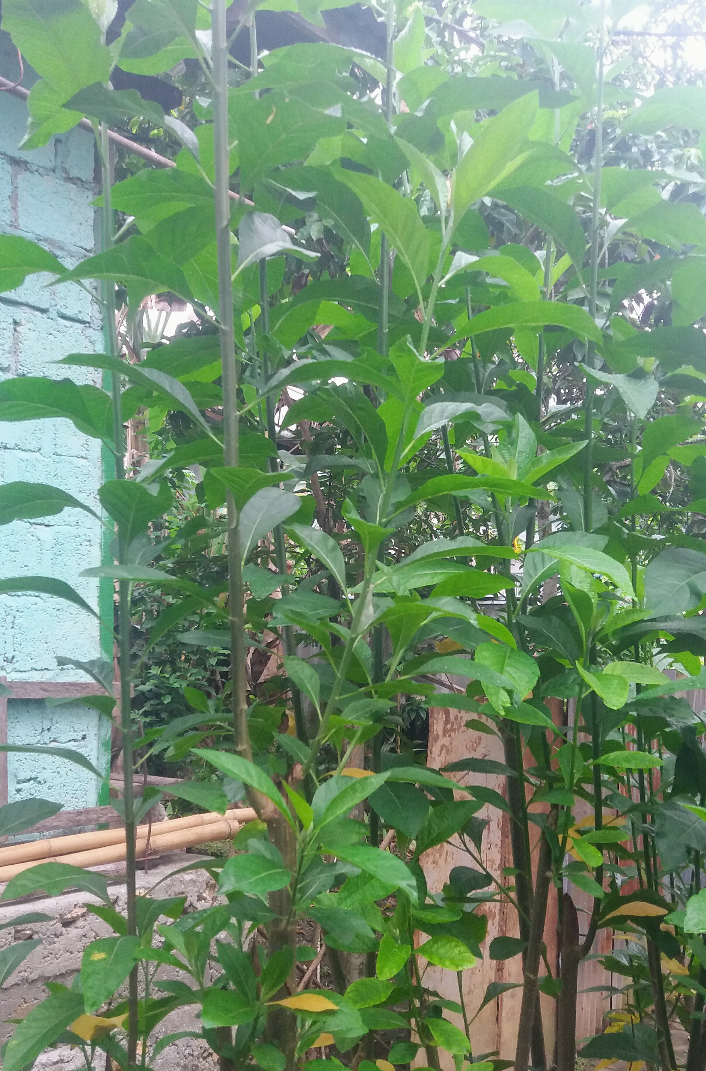 Tanaman daun afrika